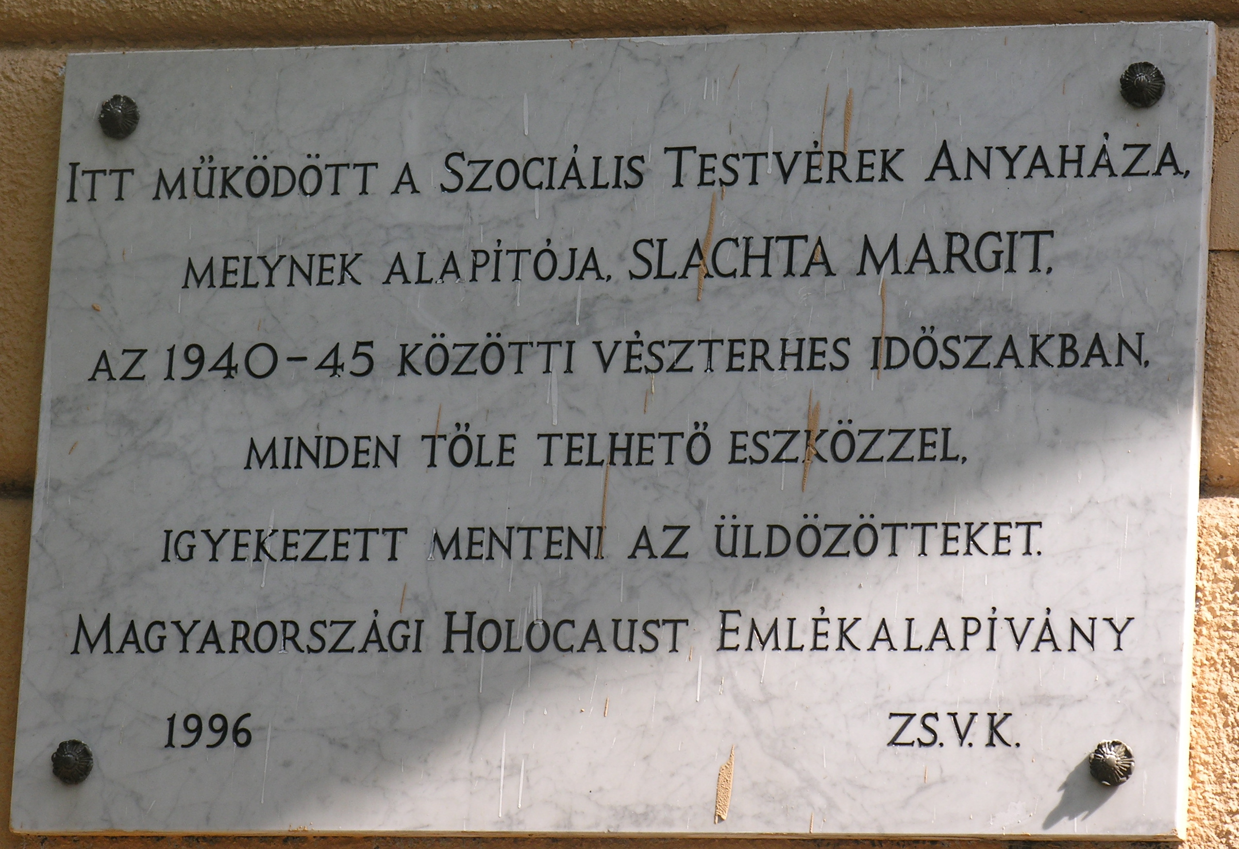 Szociális Testvérek Anyaháza - emléktábla, Budapest, XIV., Thököly út 69.